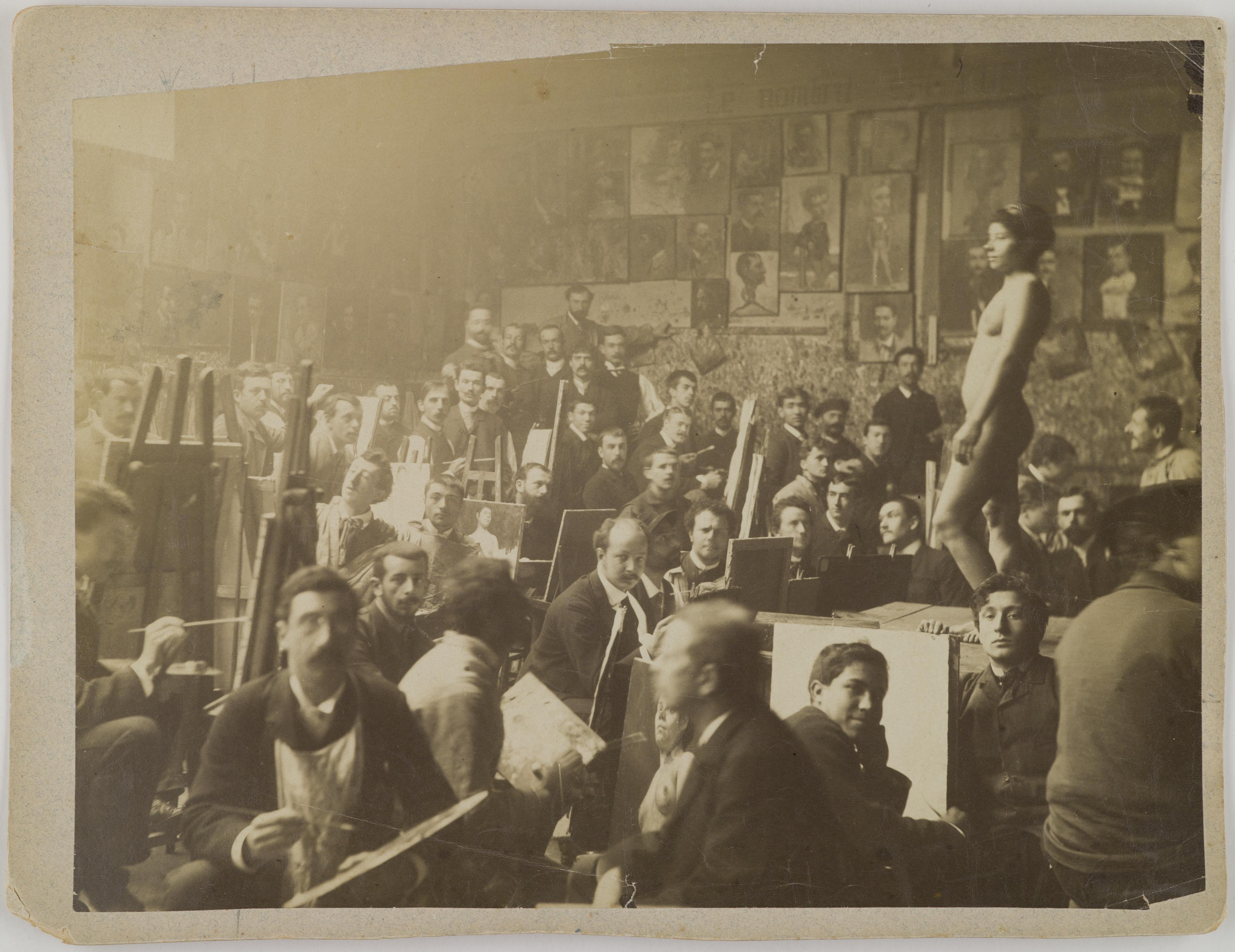 Elävänmallin maalausta. Opiskelijaryhmäkuva Académie Julianista Pariisista 1880-luvulta. Axel Gallén istuu mallin polven tienoilla. Gallén opiskeli maalausta Pariisissa vuosina 1884-1889, aluksi Académie Julianissa ja sitten muissakin oppilaitoksissa, ja maalasi eri ystäviensä ateljeissa. 1886-1887 hän palasi yli vuodeksi Suomeen, mutta jatkoi Pariisin-opintoja sen jälkeen. kuvauspaikka: Ranska, Pariisi ajoitus: 1884-1889 kuvaaja: kuva-alan mitat: 203x?mm tekniikka: merkintöjä: inventointinumero: Kot.1.a/9 kokoelma: Akseli Gallen-Kallelan valokuvakokoelma tutki lisää / explore further: Tiedätkö lisää tästä kuvasta? Kerro meille! Do you have information on this photo? Let us know!